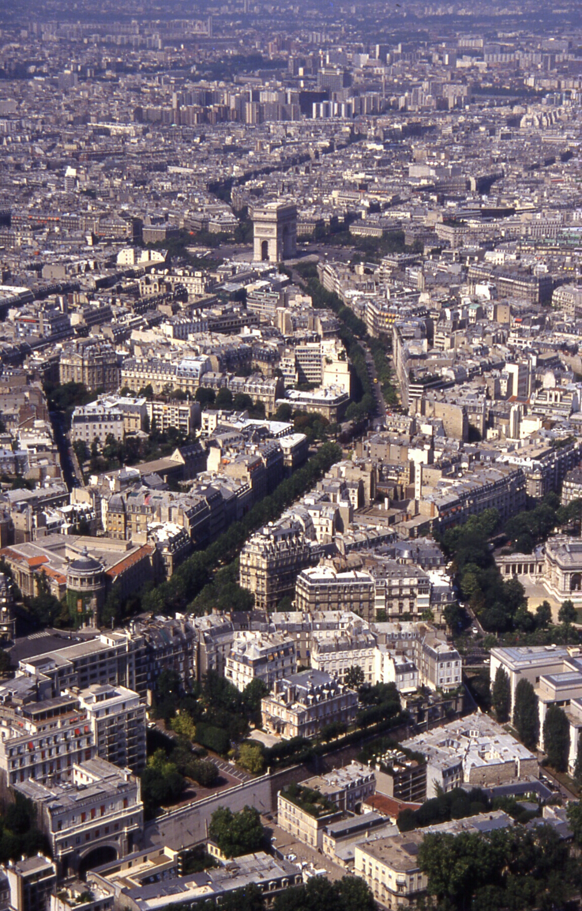 Paris Blick vom Eiffelturm 1991-1